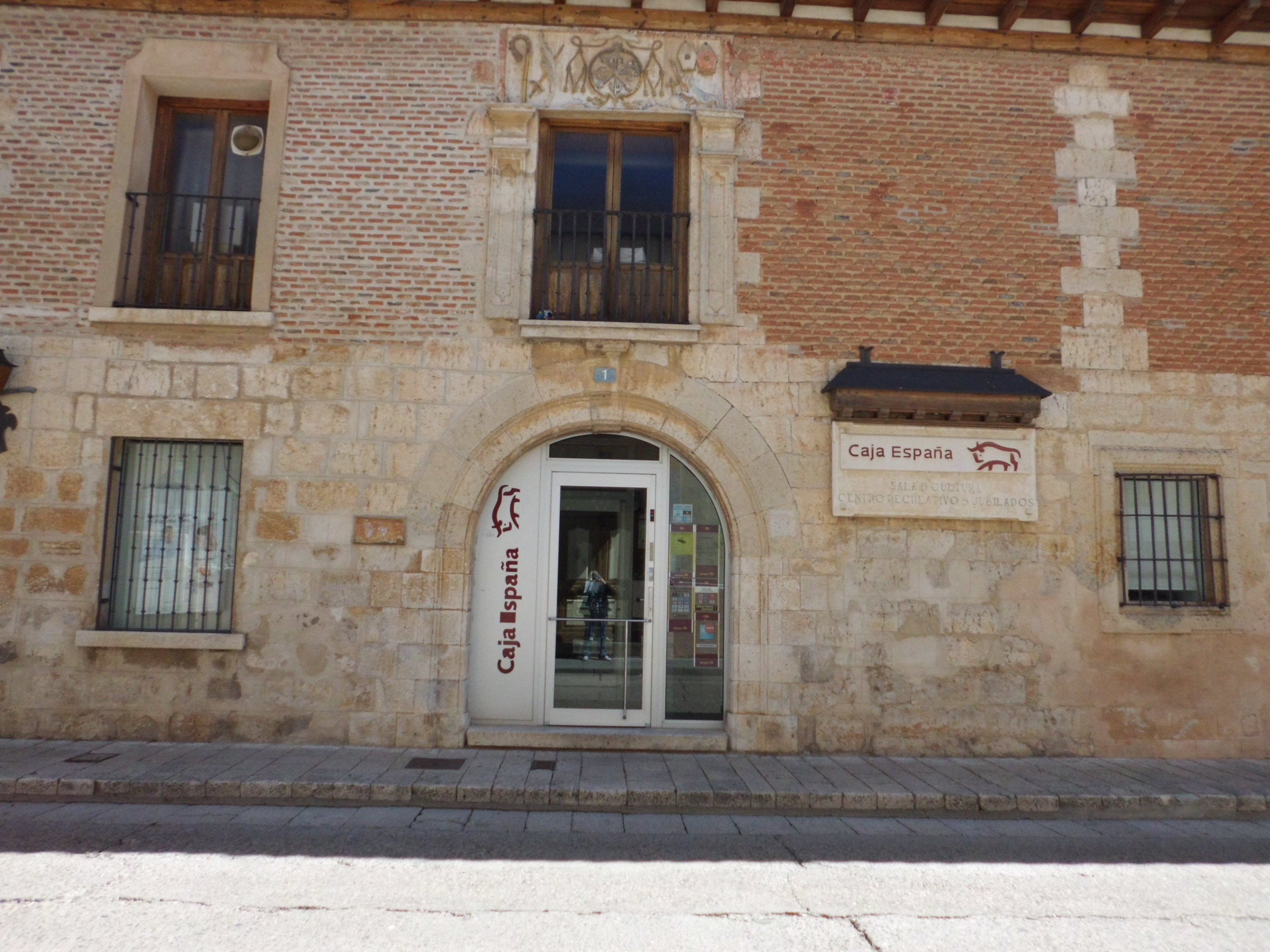 Casa Quijada Alcalde. Casa del siglo XVIII ubicada en la calle El Campillo de Cigales, Valladolid. Construida en piedra y ladrillo perteneció a la familia Quijada Alcale, familia a la que pertenecía el Obispo de Yucatán y Guadalajara (en México) fray Antonio Alcalde. Ostenta por encima del balcón las armas nobiliarias de este personaje. Durante años fue la sede de Caja España y en el año 2014 se utiliza como Sala de Cultura.